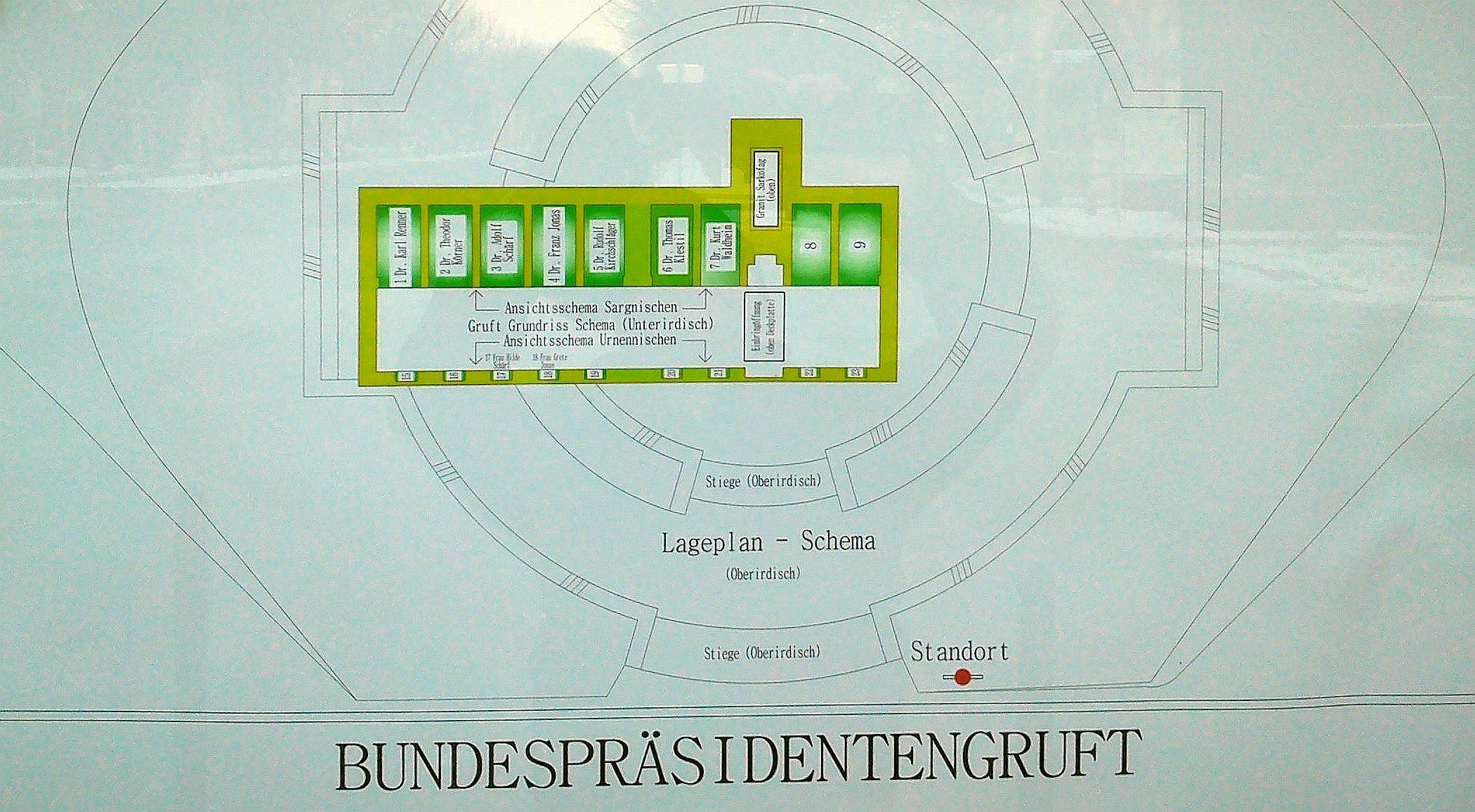 Zentralfriedhof Wien, Plan der Bundespräsidentengruft